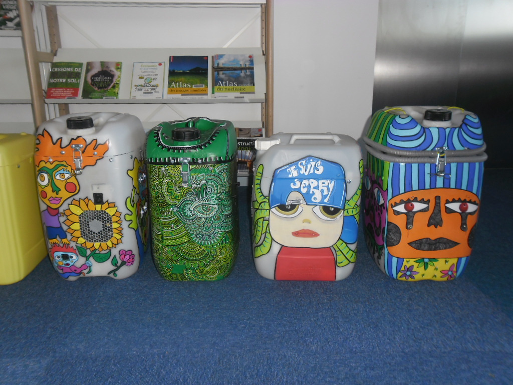 les 4 jerrys ont été faits par Maurice et la décoration peinture par Odile